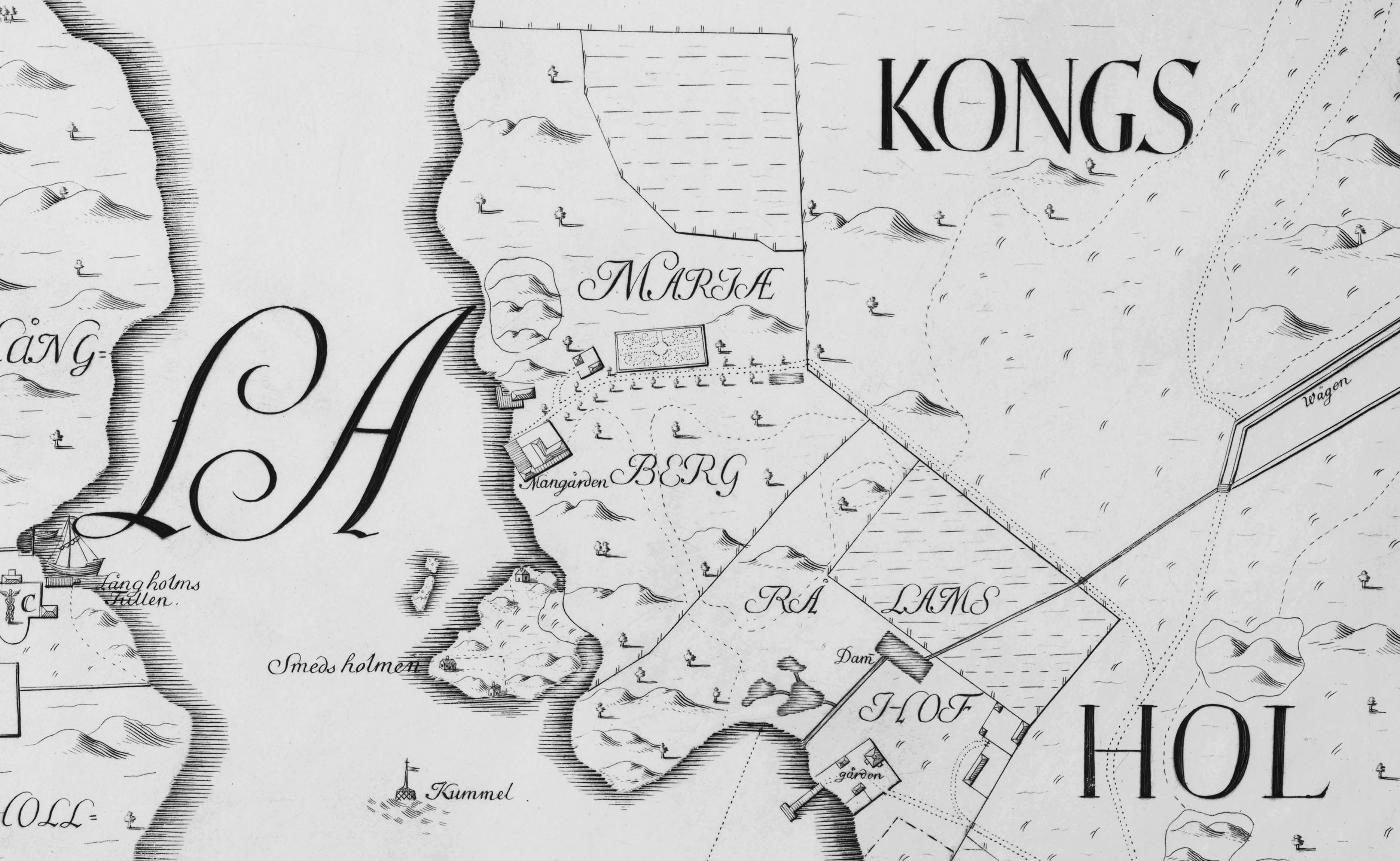 Egendomen Marieberg och Rålambshov på Petrus Tillaeus Stockholmskarta (norr är till höger)